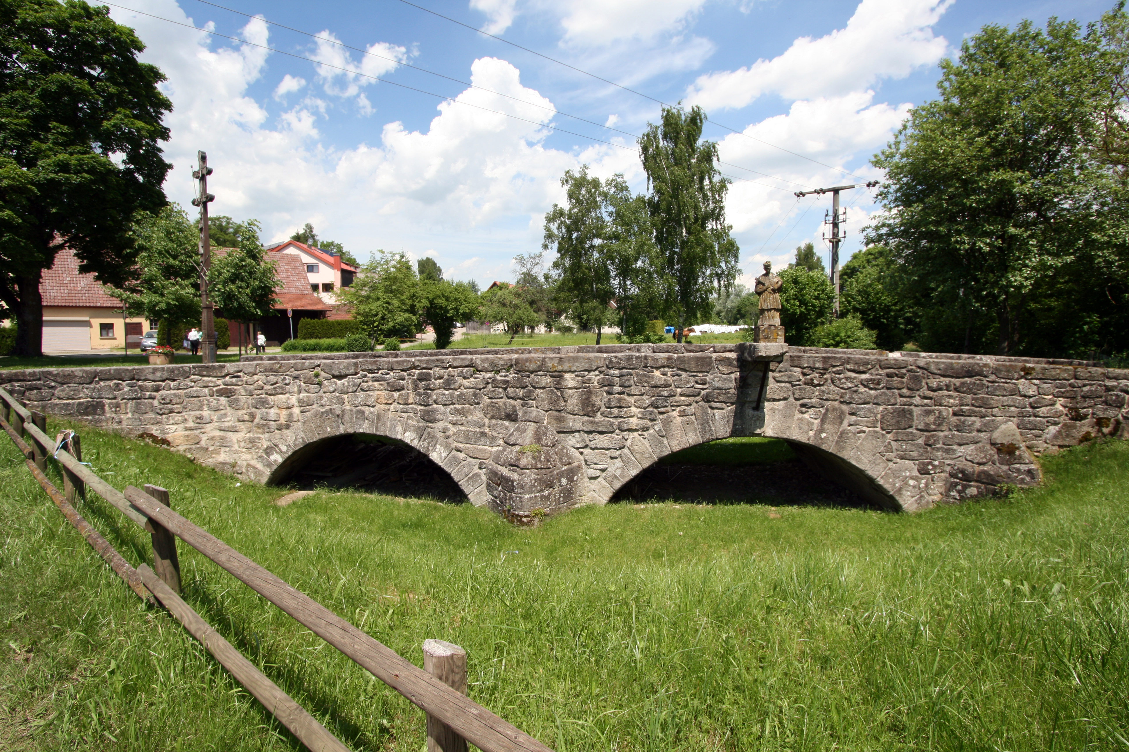 Ehemalige Brücke über die Jagst in Rindelbach, einem Ortsteil von Ellwangen (Jagst).